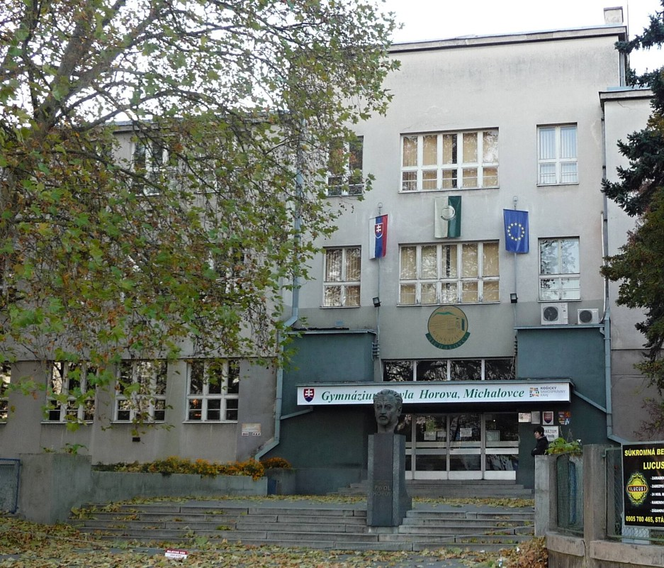 Budova Gymnázia Pavla Horova v Michalovciach. Na schodisku busta Pavla Horova